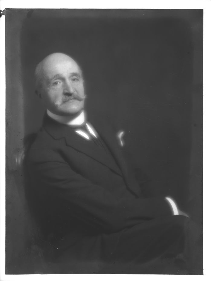 Emilio Sommariva (1860-1926) Ritratto di Giovanni Beltrami, artigiano del vetro (1922-1923)